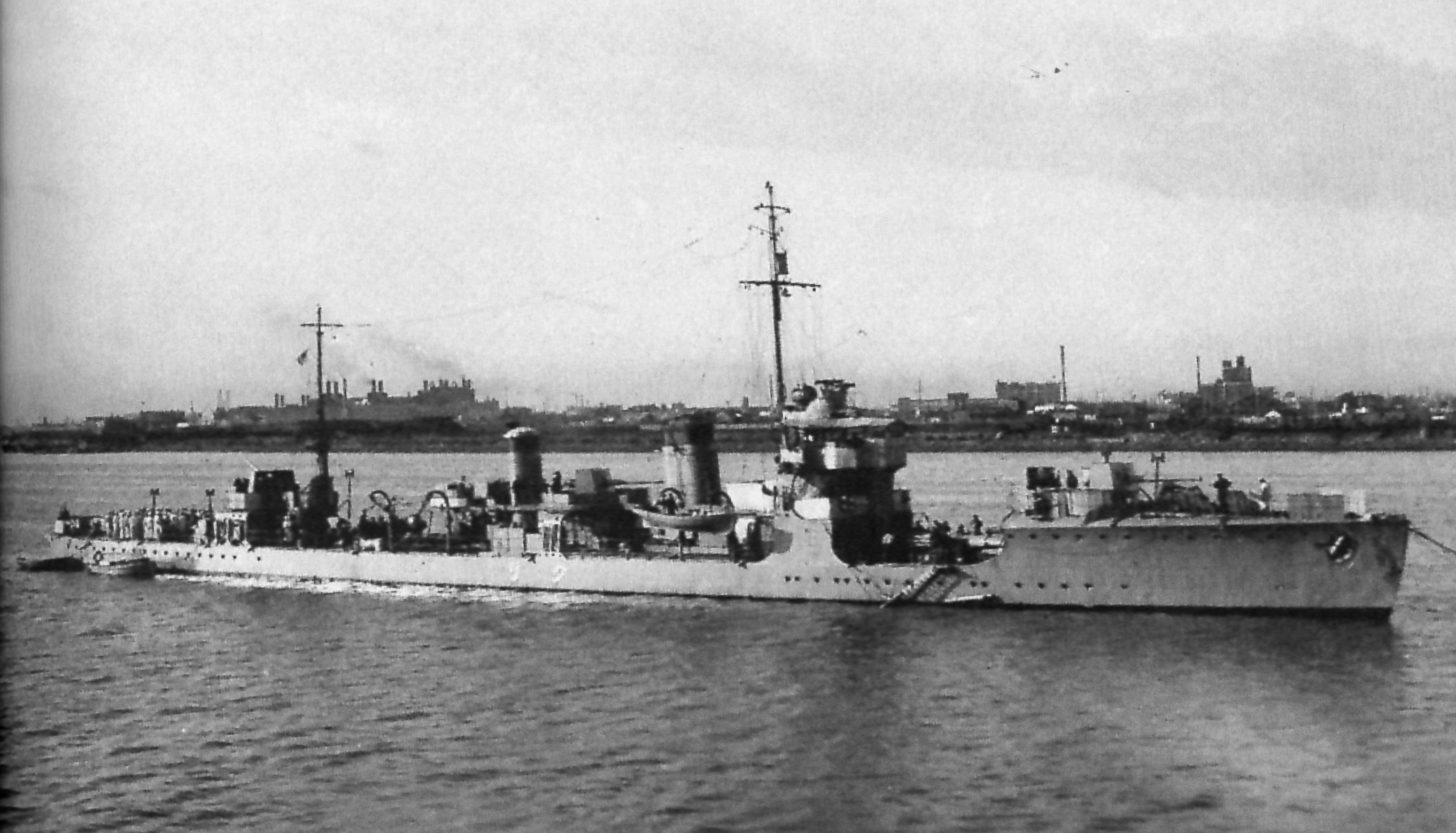 第二次上海事変に出動時の昭和12年9月~12月に撮影された、黄浦江に停泊中の「栗」。